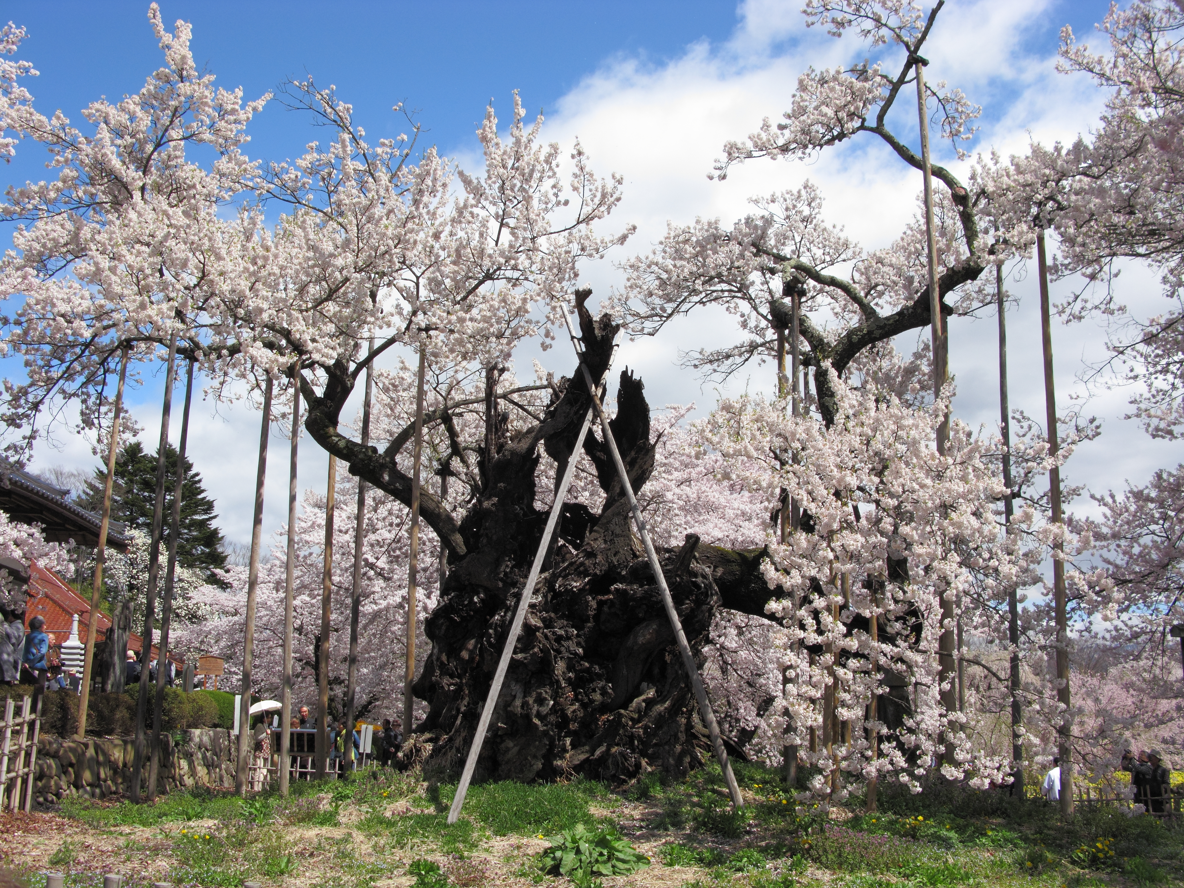 山高神代桜（山梨県北杜市）